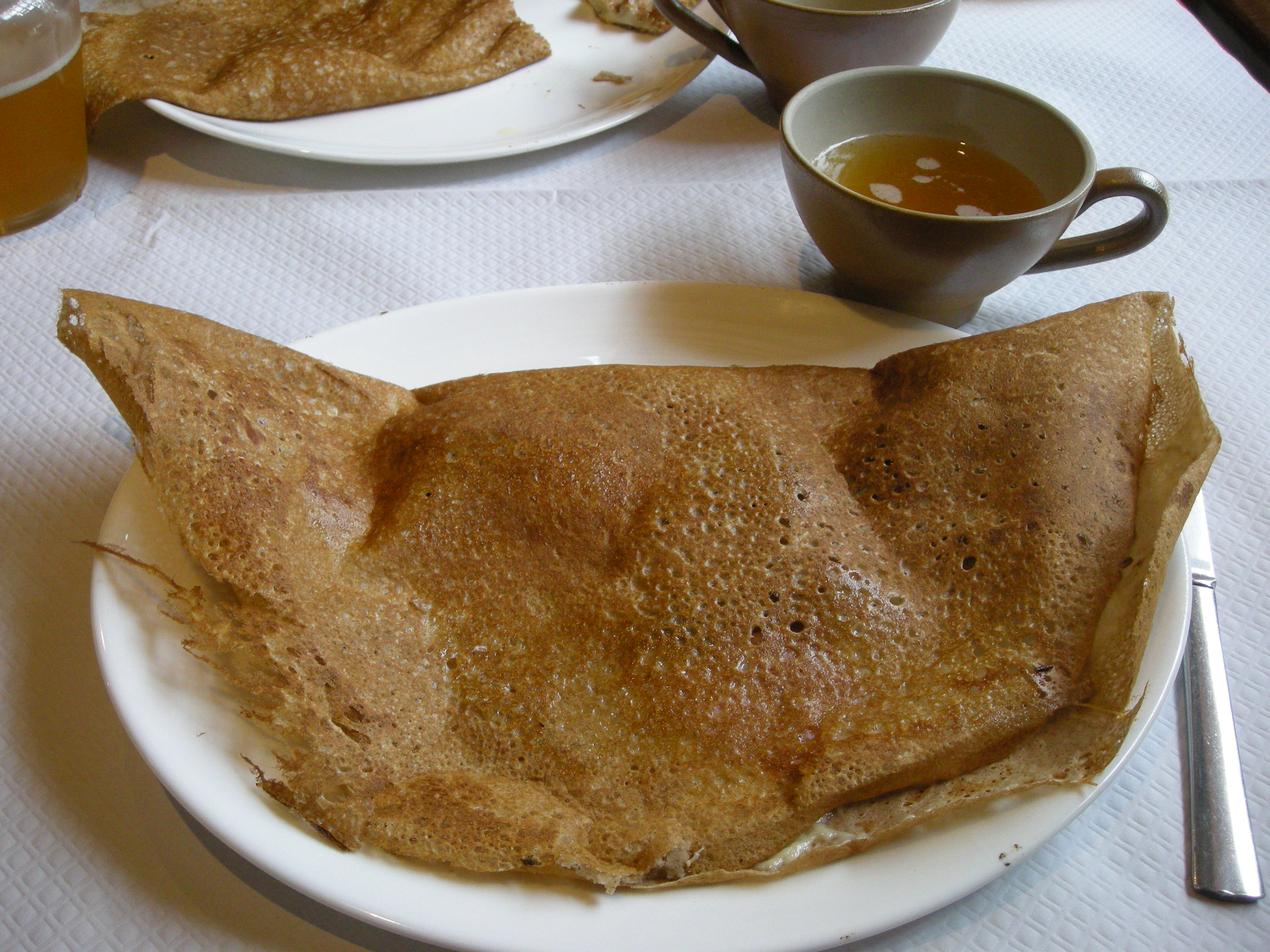 Crêpe complète et cidre brut à Villedieu-les-Poêles (Normandie)